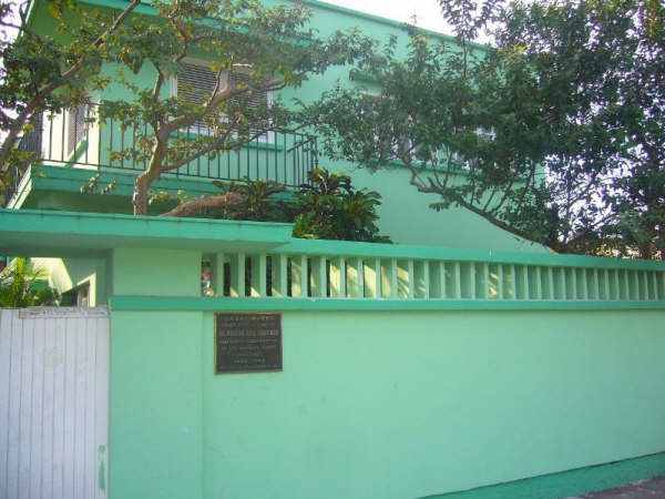 Casa Museo Adolfo Ruis Cortines